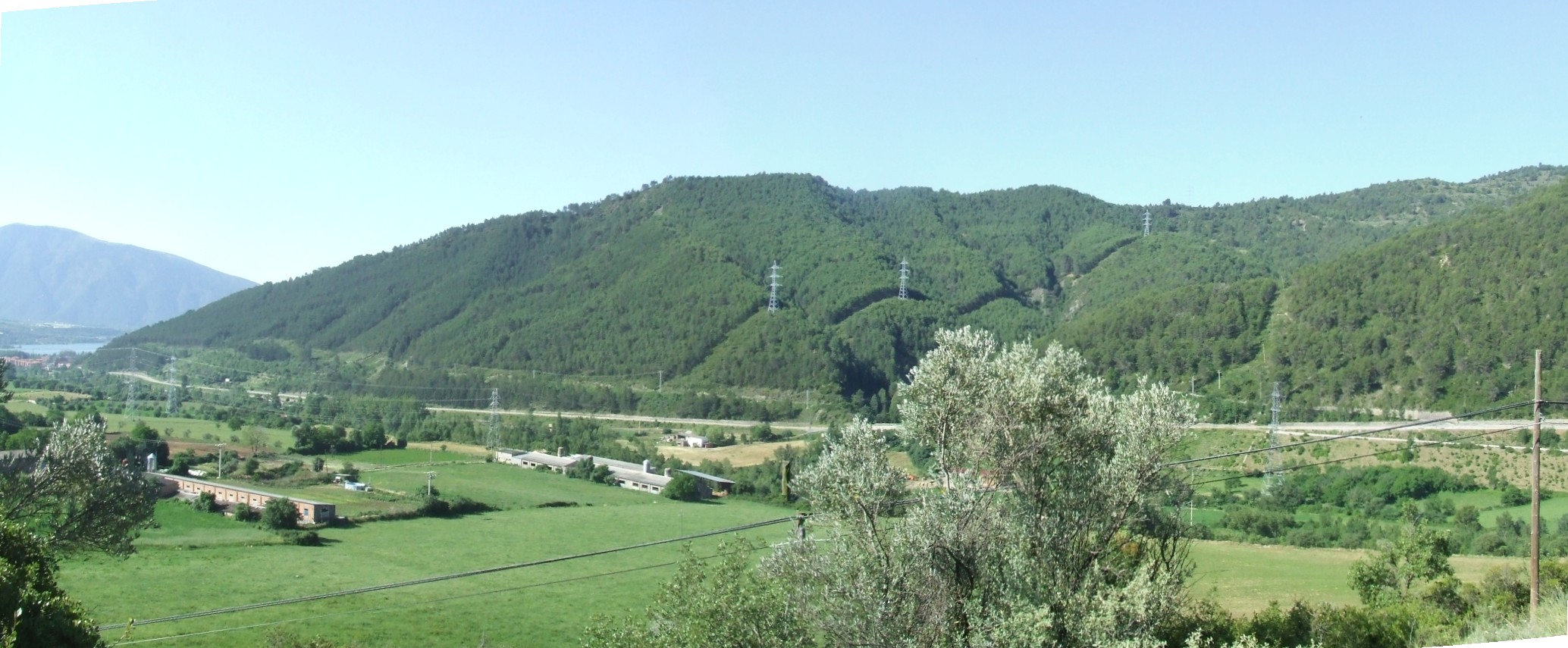 La Muntanya de Santa Magdalena i el Serrat de Romers (el Casot i lo Tossalet) (la Pobla de Segur i Conca de Dalt, Pallars Jussà)